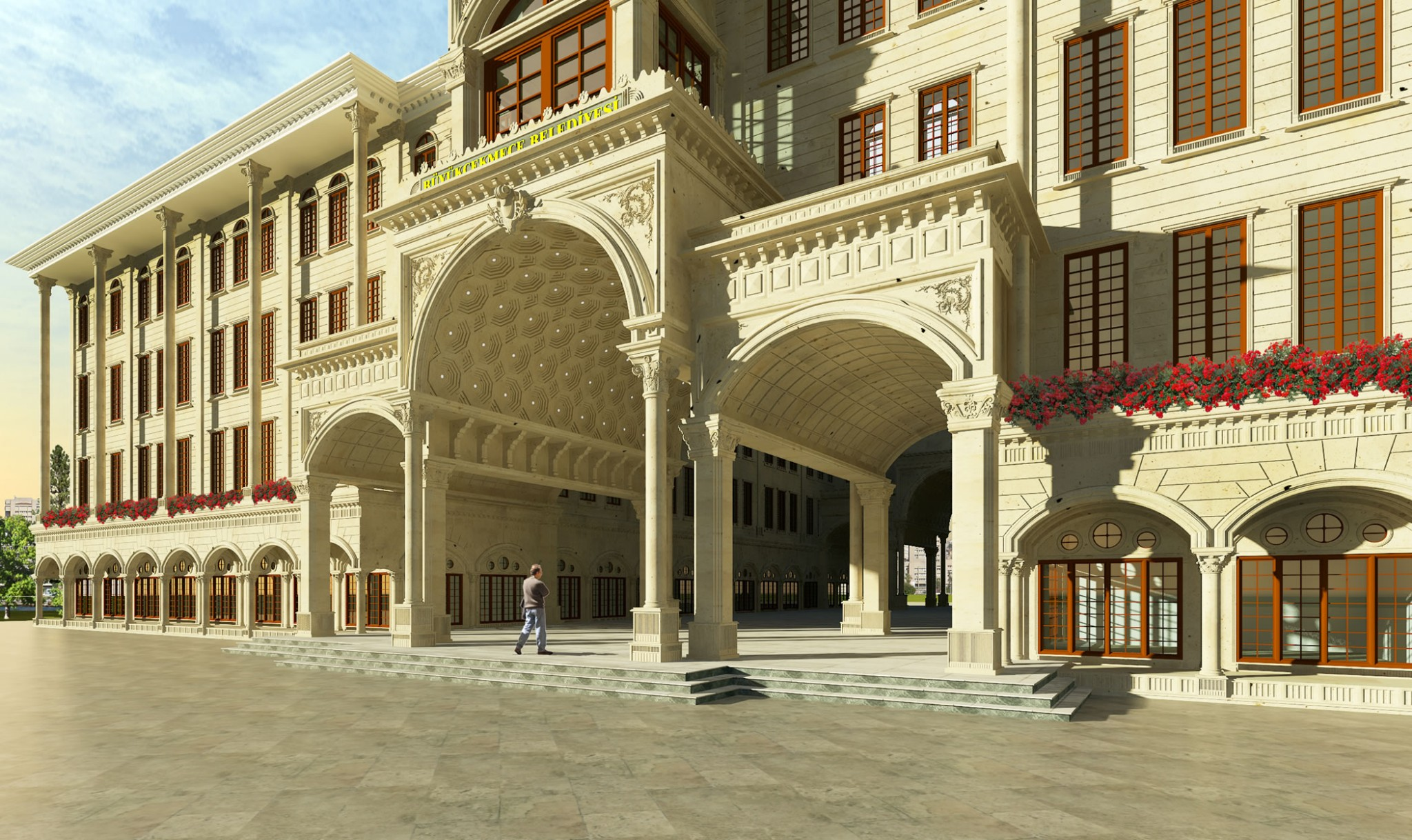 Büyükçekmece Belediyesi Yeni Bina